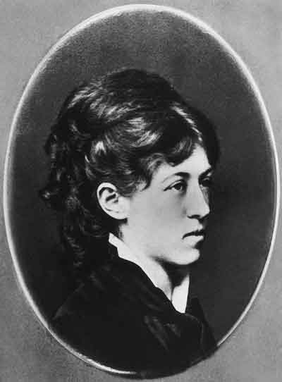 Kublitskaya-Piottukh_(Beketova)_Aleksandra_Andreevna